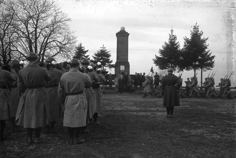 Die zweite Zone des besetzten Rheinlandes frei! Parade der französischen Truppen auf der Feste Ehrenbreitstein vor ihrem Kommandeur Thervines nach dem Einholen der Tricolore.